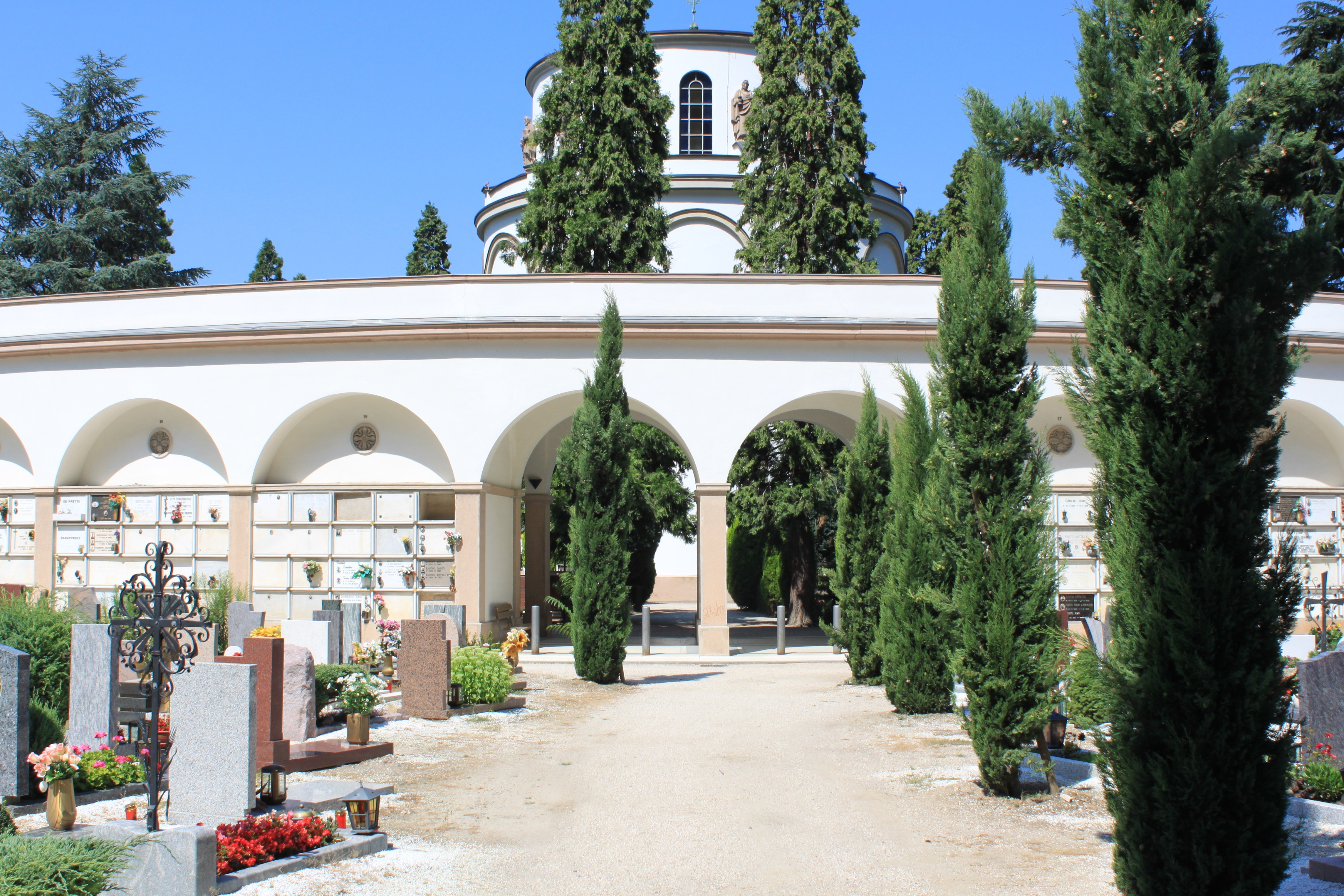 Städtischer Friedhof von Bozen